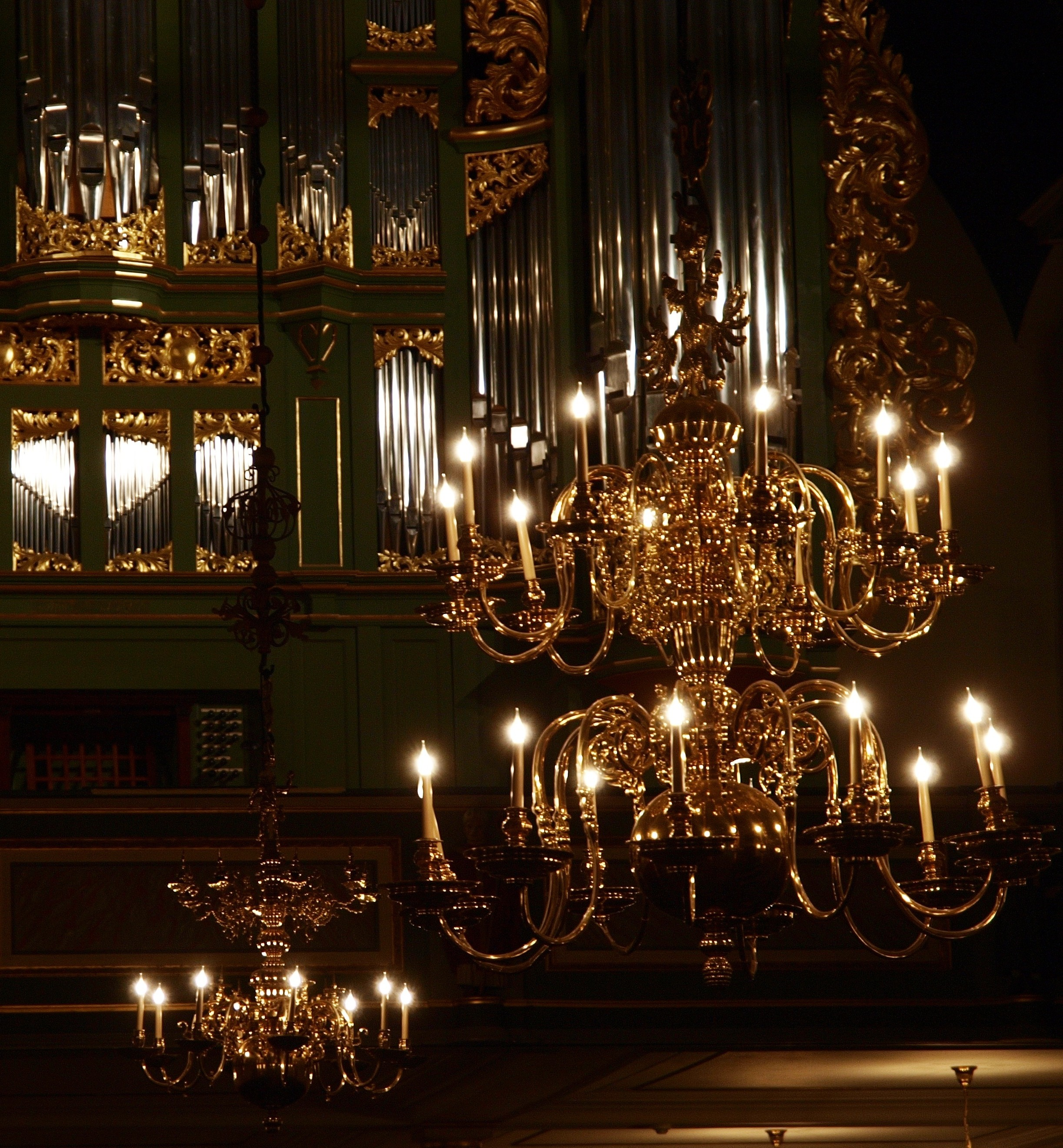 To av lysekronene i Oslo domkirke. I bakgrunnen orgelet. Klippet versjon.